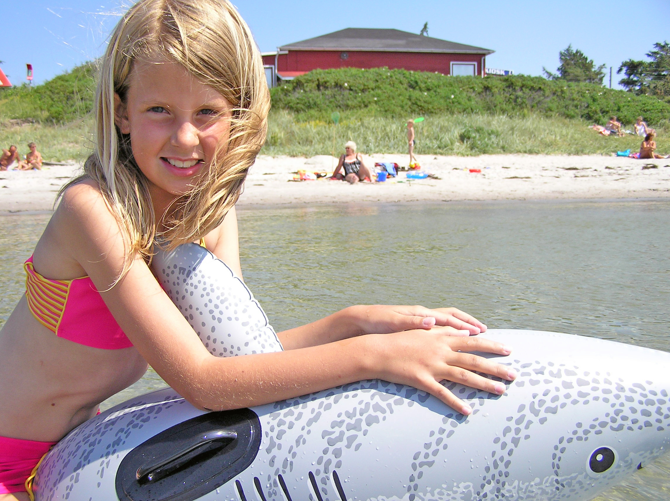 Svinø Strand set fra vandet